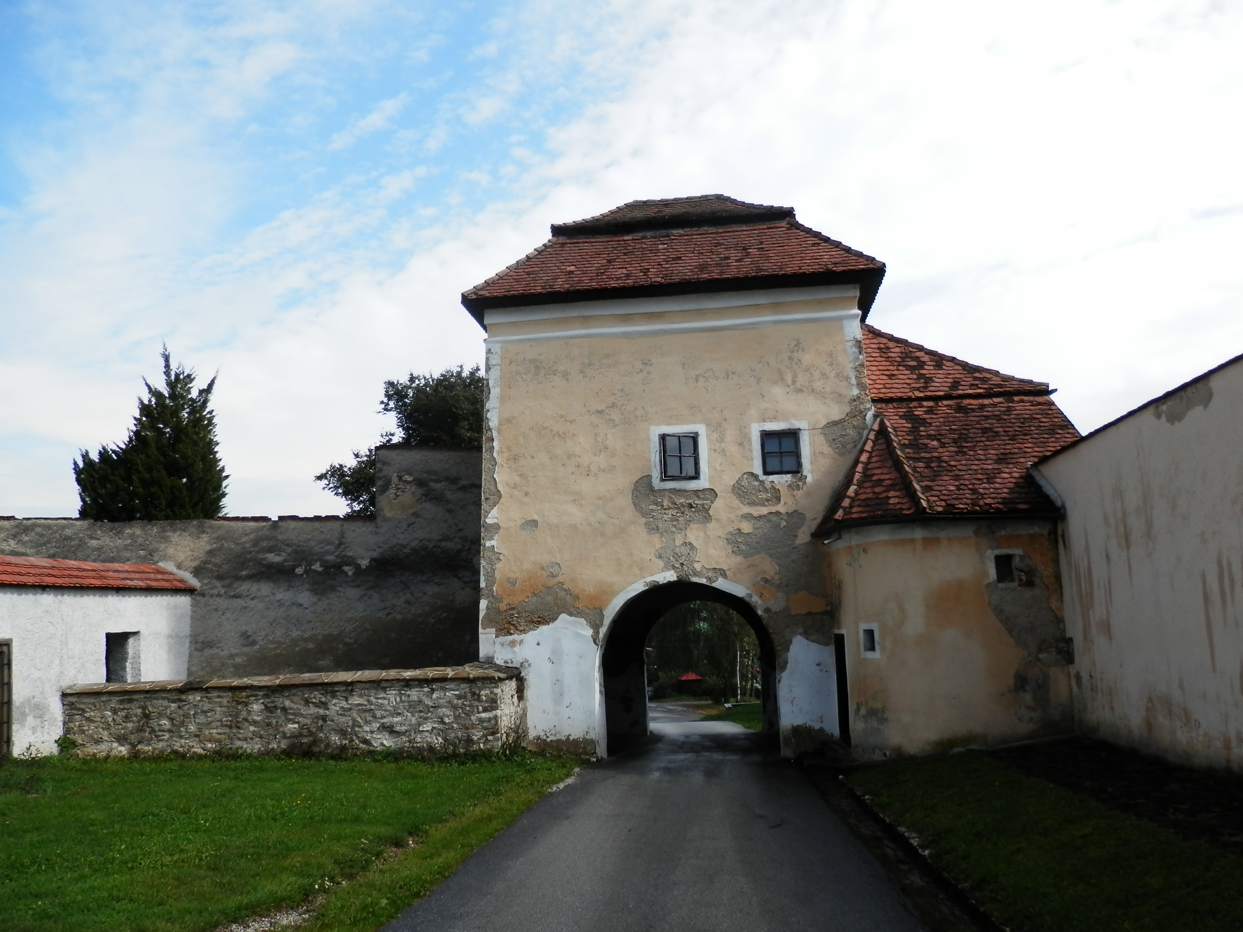 Mestské hradby. Neskoro renesančná, Dolná (východná) brána opevnenia. Doba vzniku 1662-1665. Spišská Kapitula-Spišské Podhradie.